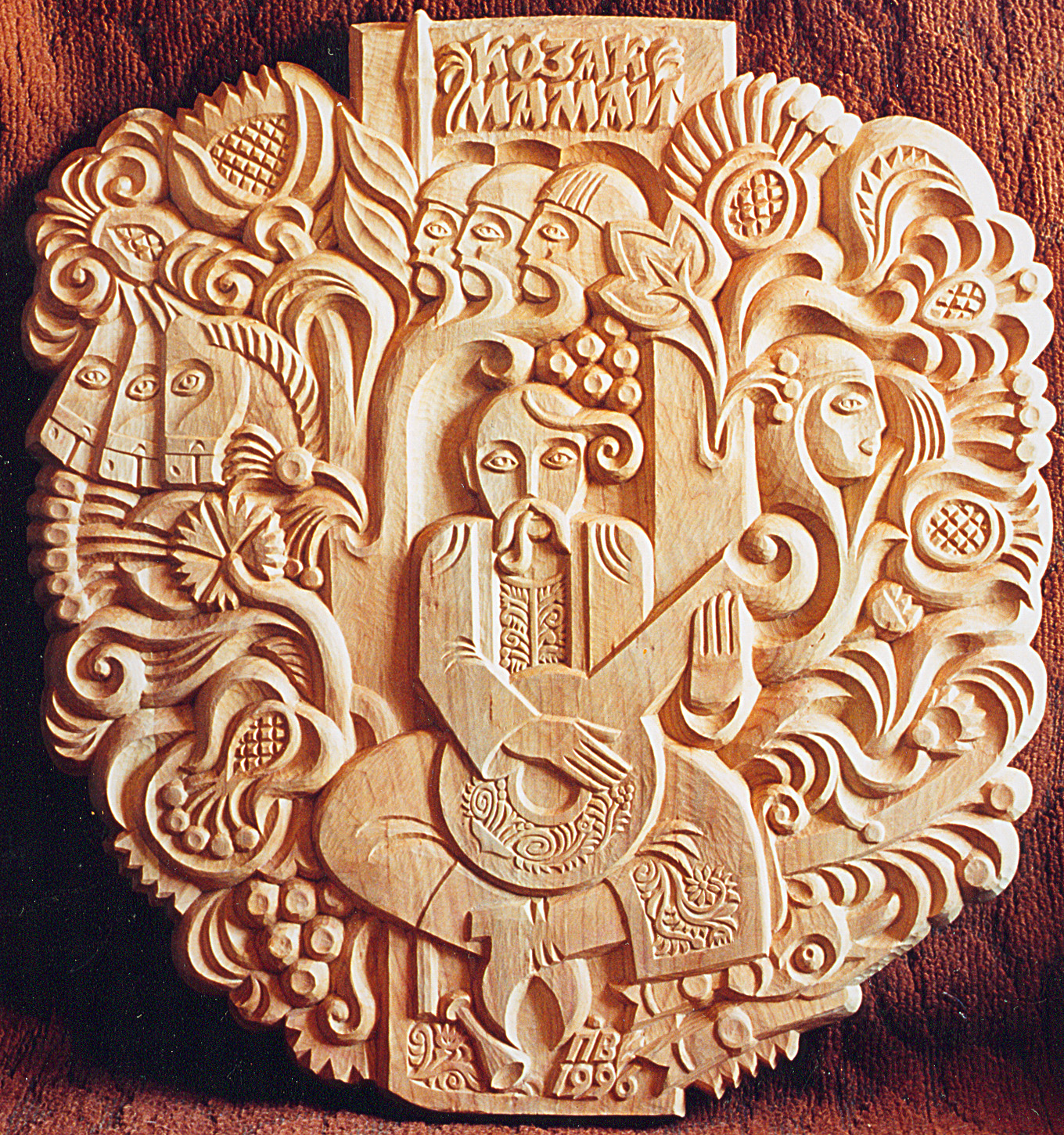 Творення Волика Павла Івановича